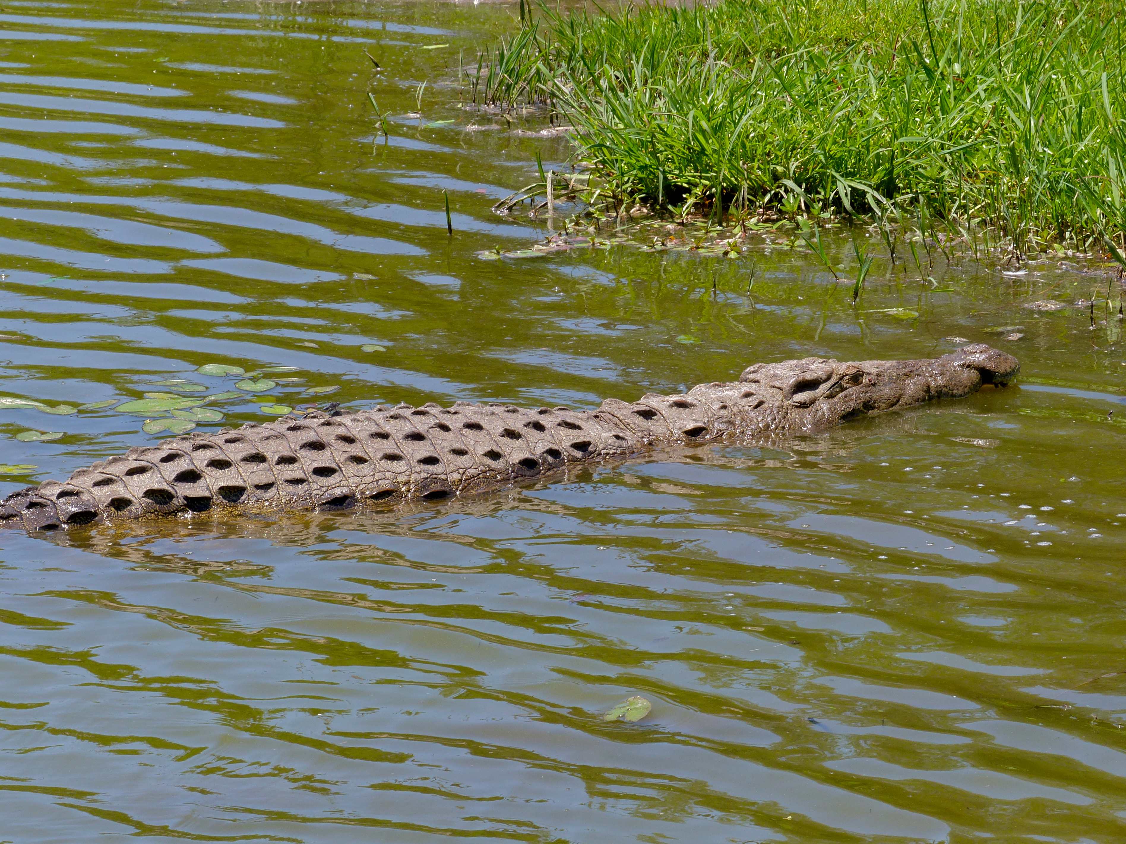 Lake Panic, Kruger NP, SOUTH AFRICA